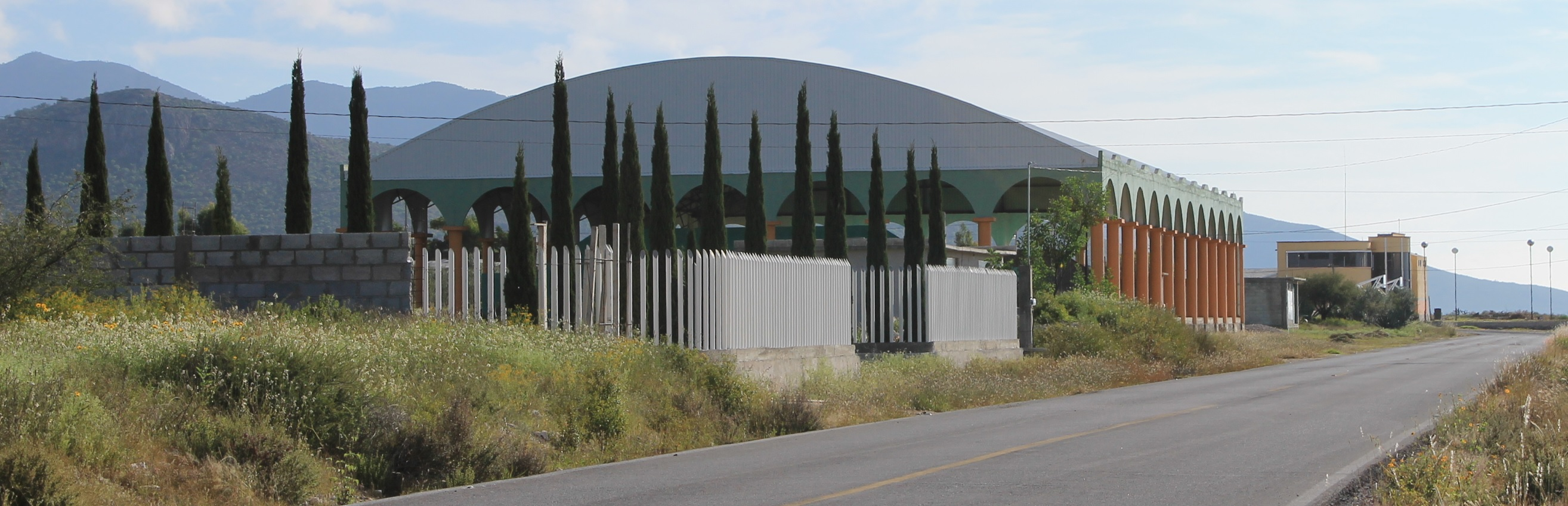 El Olivo Ixmiquilpan Hidalgo México